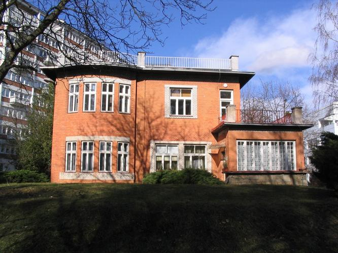 Vila J.a.Bati